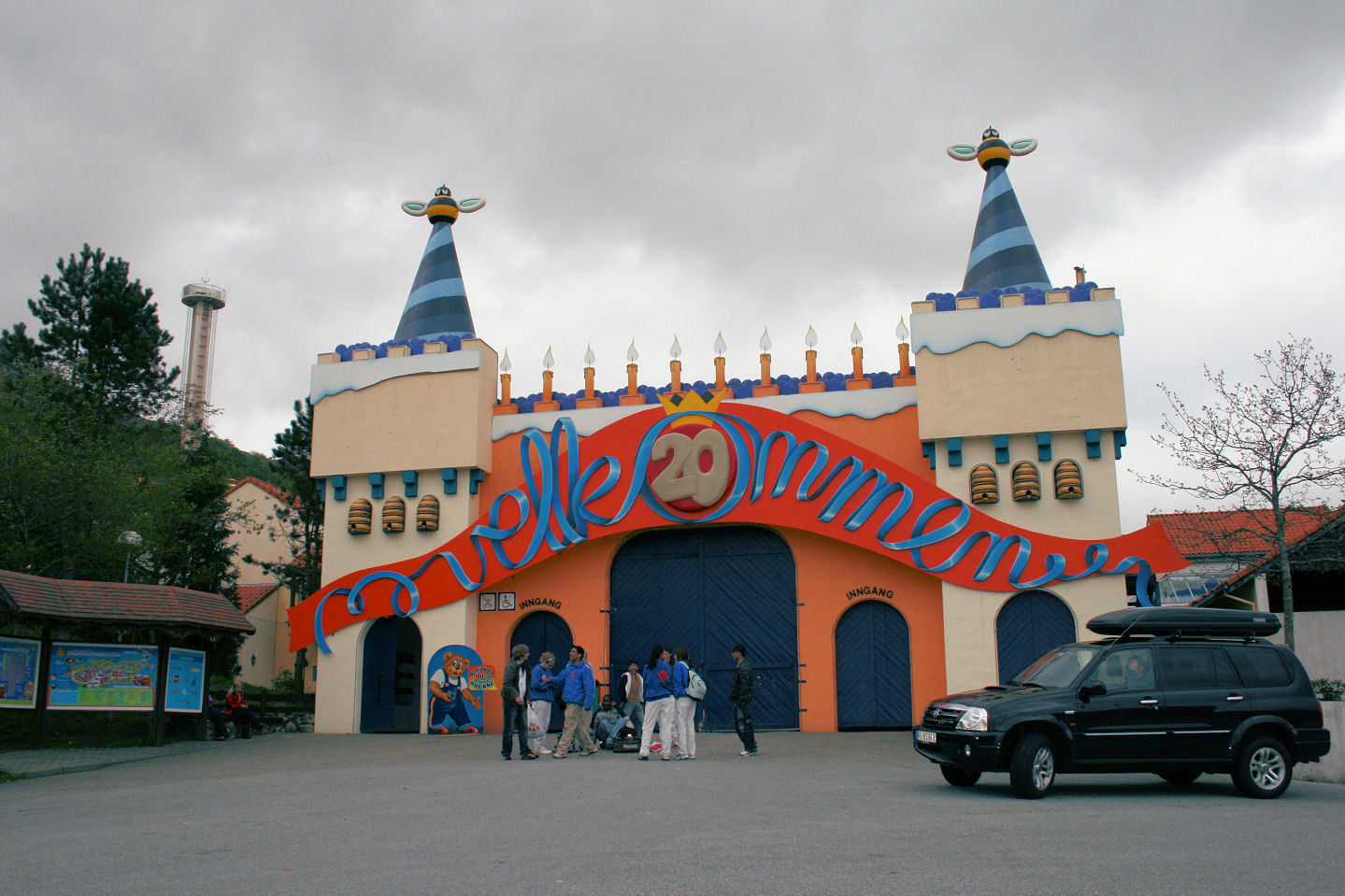 Kongeparken, Rogaland